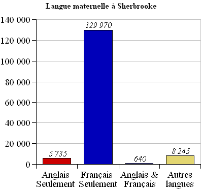 Langues maternelle population sherbrooke